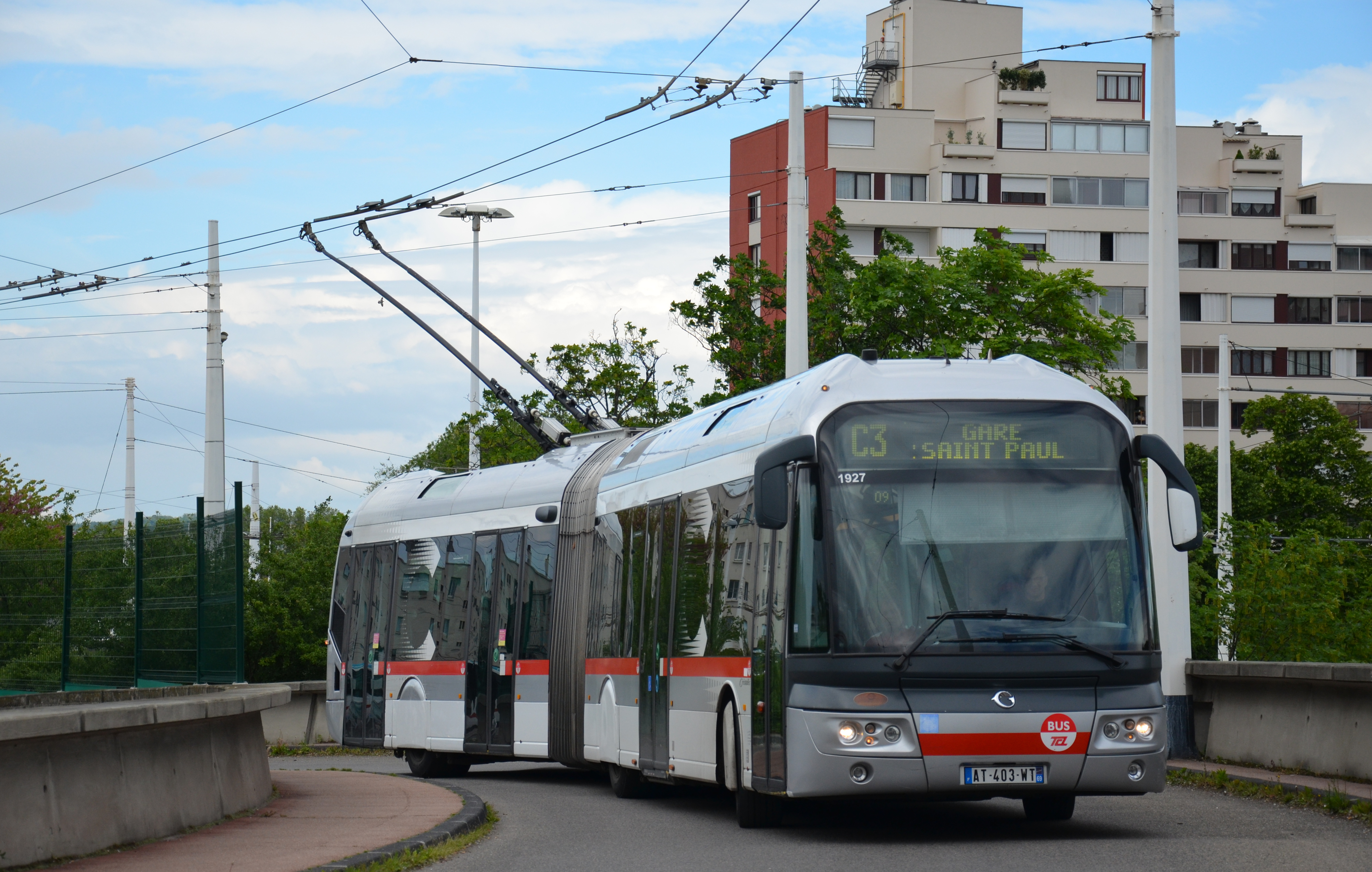 Irisbus Cristalis ETB18 n°1927 sur la ligne C3, au pôle d'échanges de Laurent Bonnevay, en direction de Gare Saint-Paul.